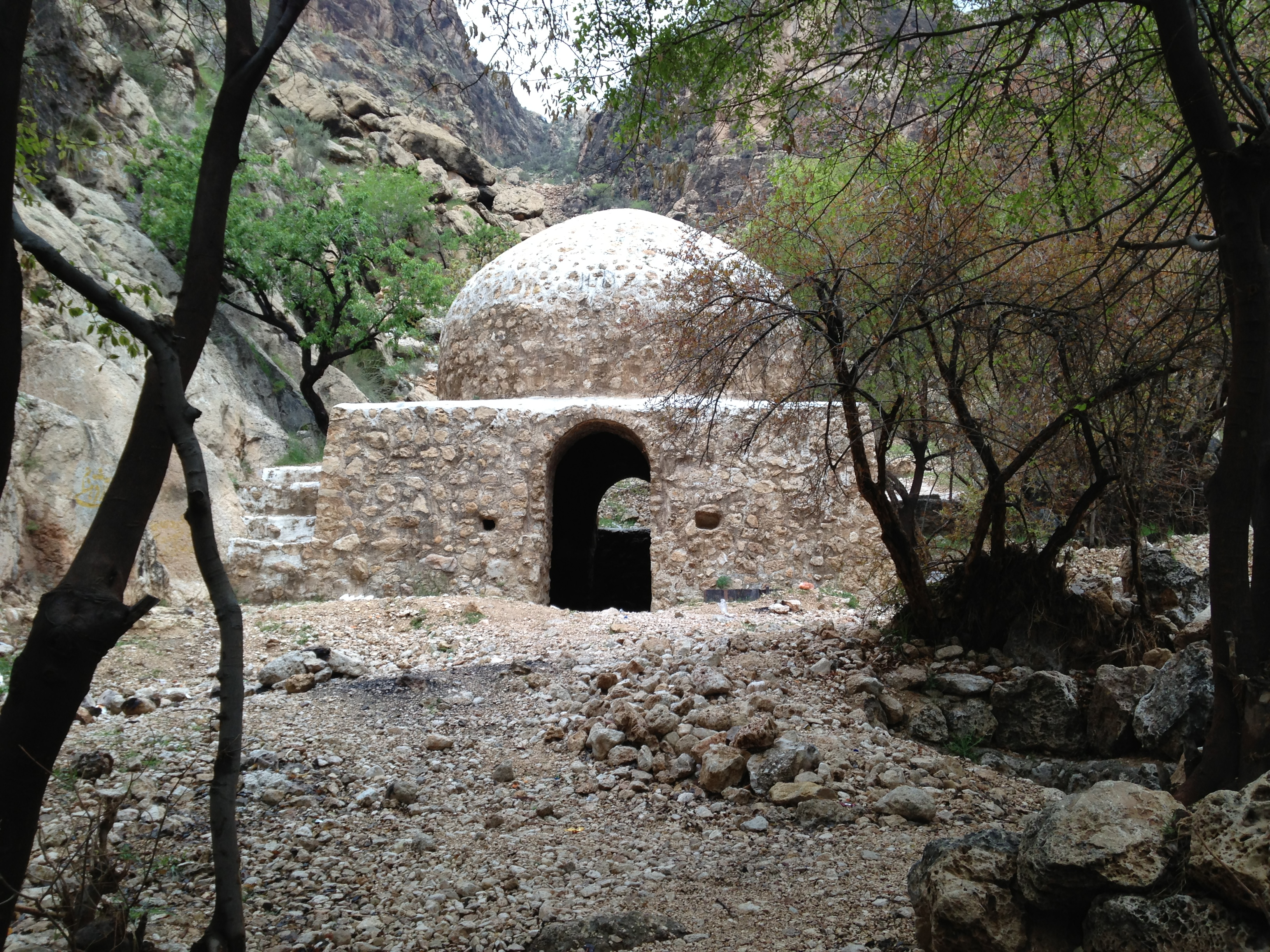 مسجد سنگی که در واقع چهار طاقی رزدشتیان بوده اما به اشتباه نام مشجد روی آن نهاده شده است